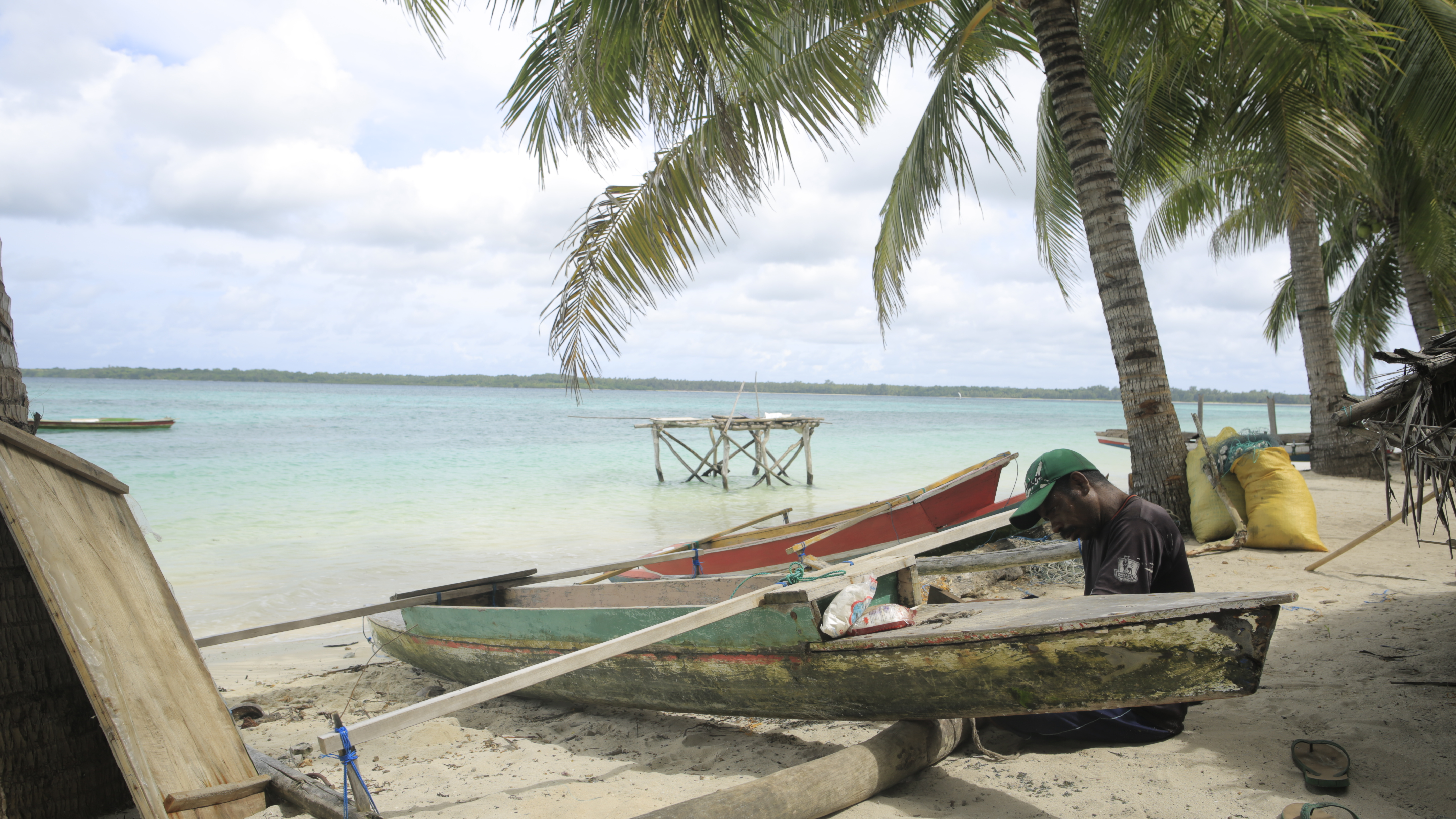 Adaut